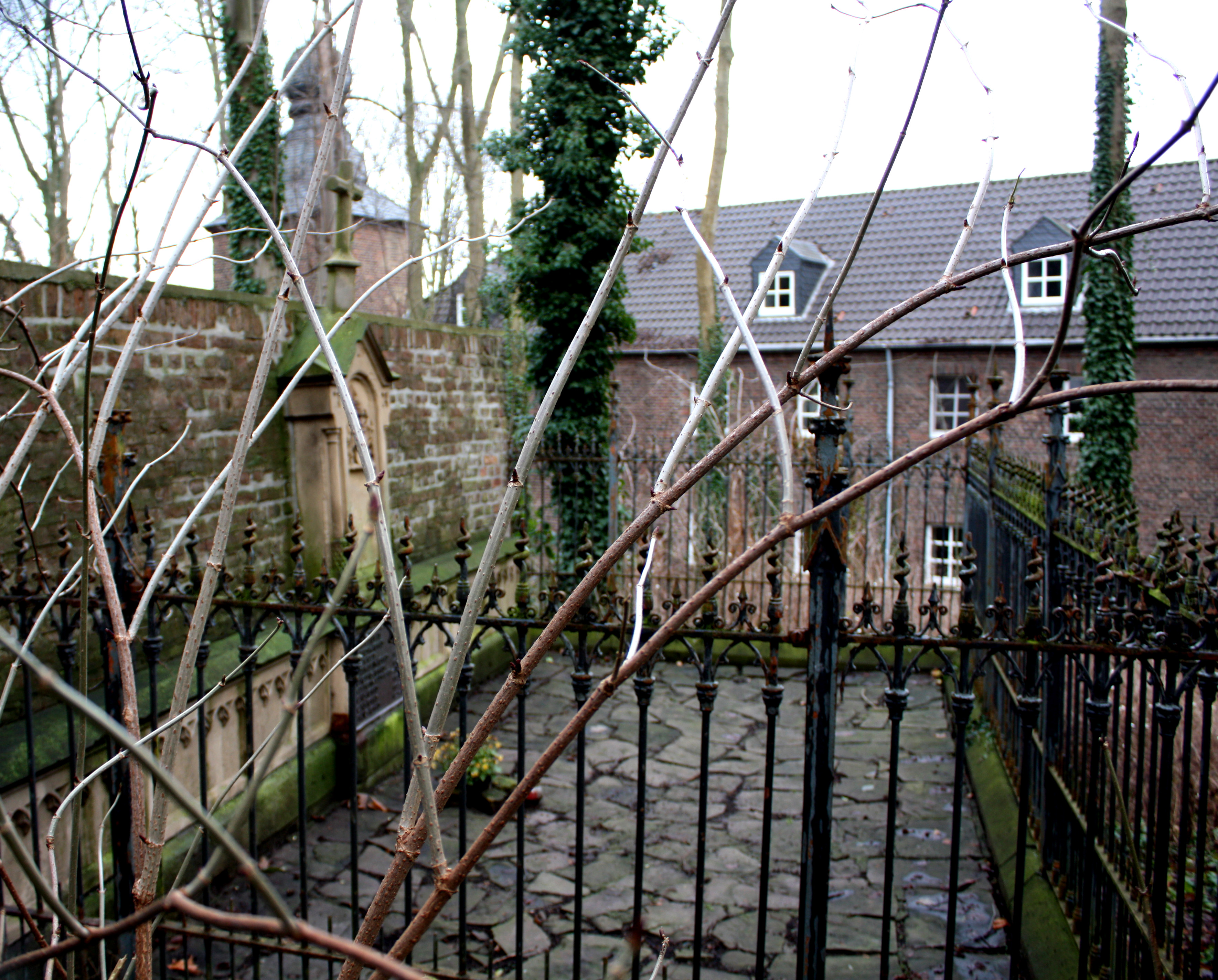 St. Johann Baptist, Kendenich. Grabstätte von Kempis und von Groote an der alten Kirchhofmauer